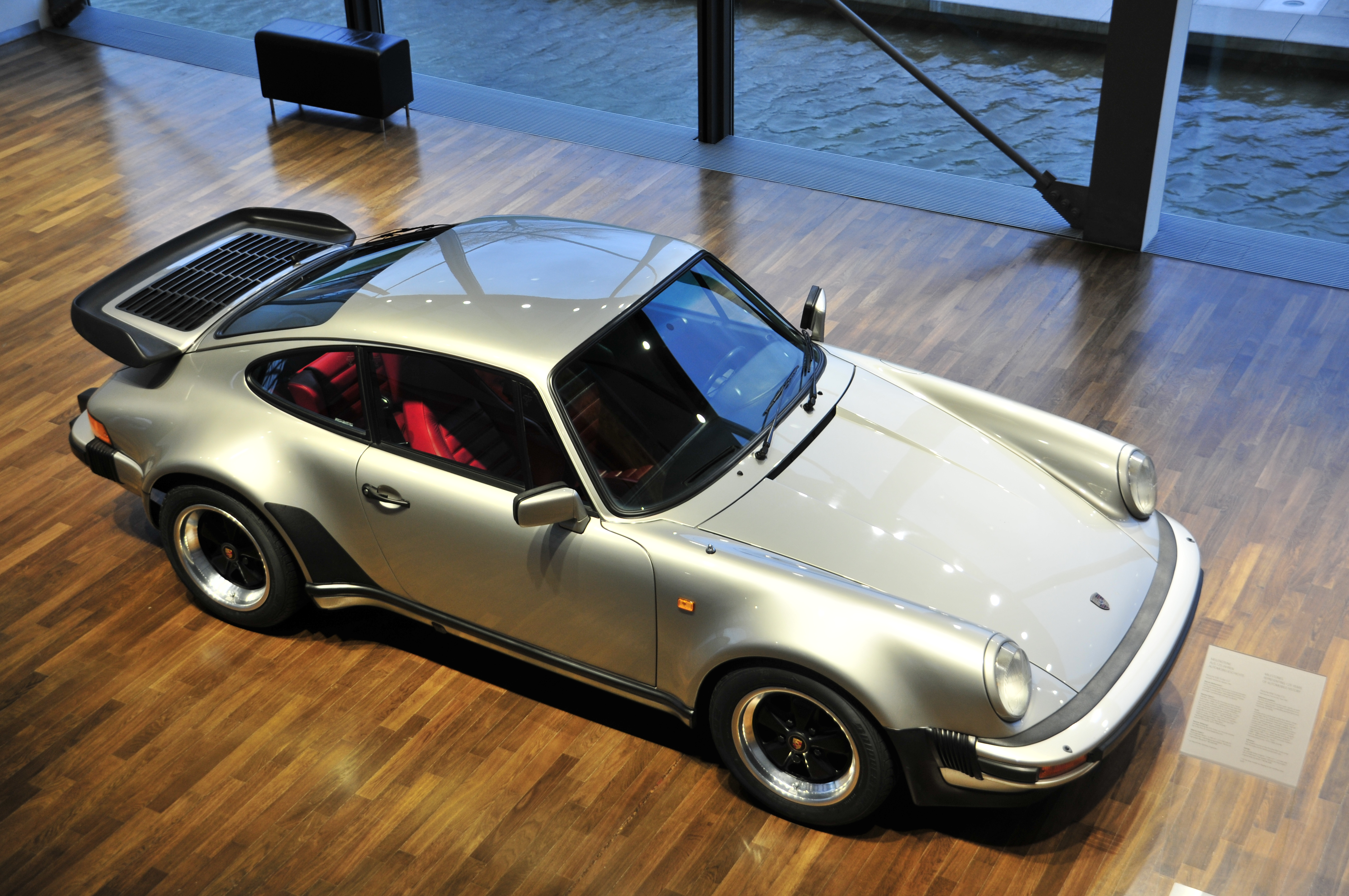 Fahrzeug in der Autostadt Wolfsburg